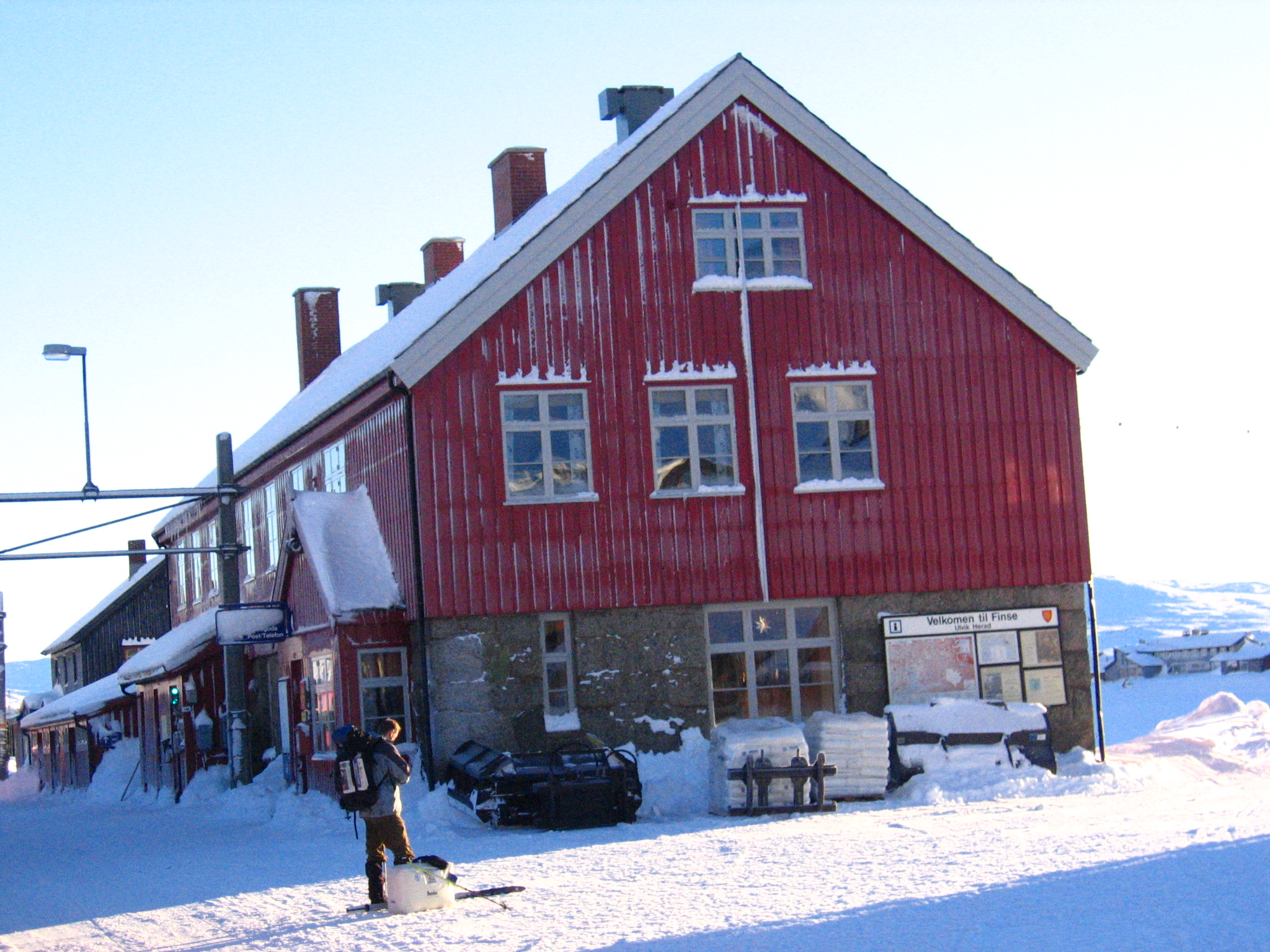 Finse jarnbanestasjon